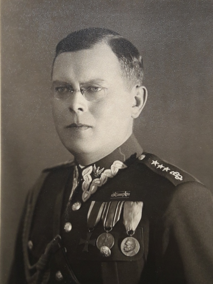 Tadeusz Szumowski w roku 1934 - kpt. dypl. (66 p. p.), wykładowca taktyki w Szkole Podchorążych dla Podoficerów w Bydgoszczy